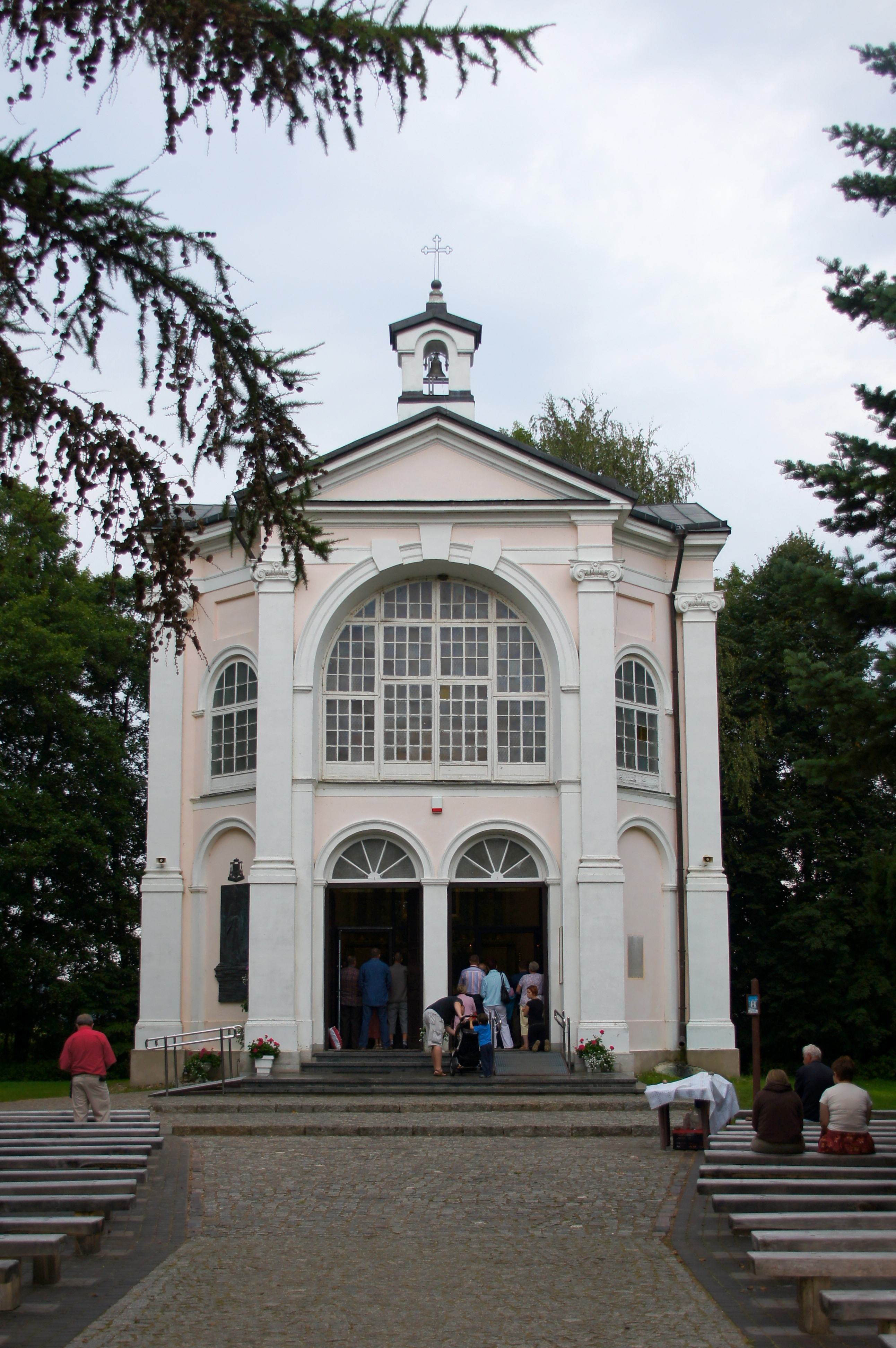 Kaplica Matki Boskiej Augustów - Studzieniczna, Augustów